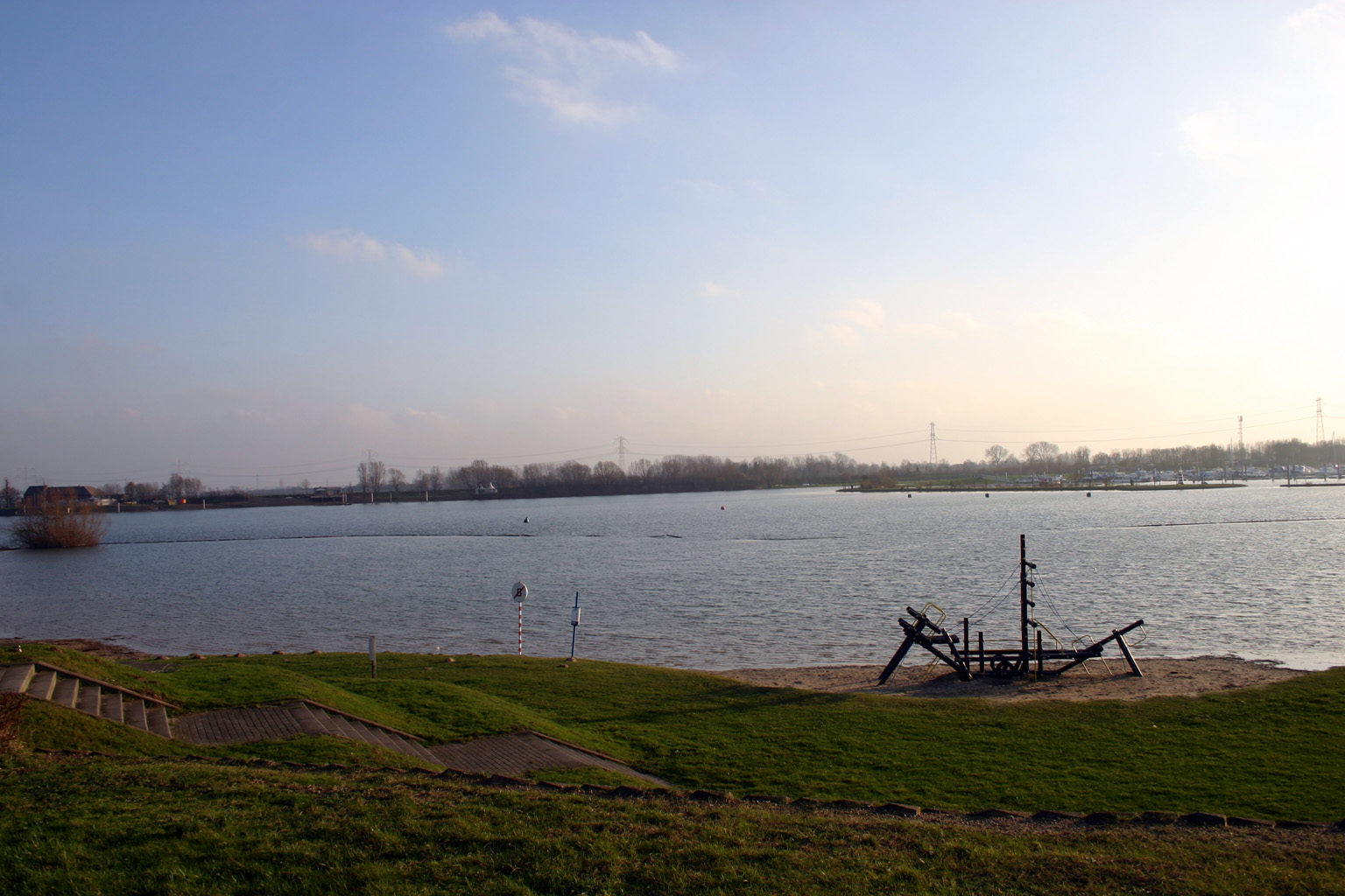 Maasplassen in Kinrooi (Belgium)